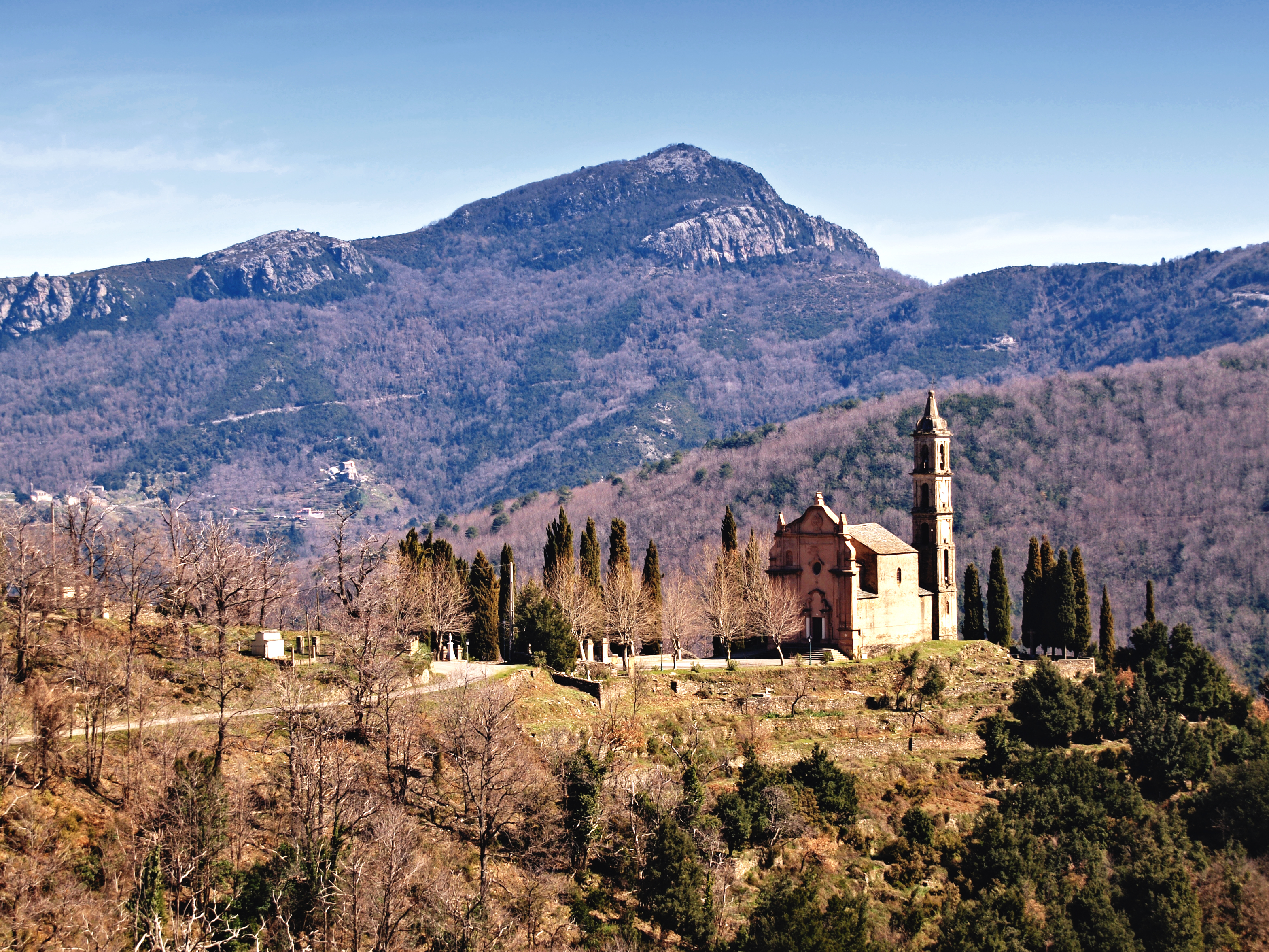 Ortiporio (Corsica) - Église Saint-Augustin et Monte Sant'Angelo